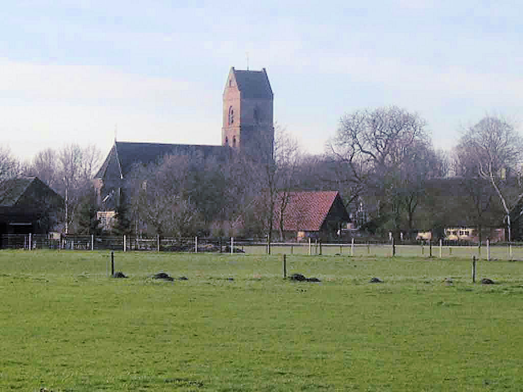 Kerk van Vledder, foto gemaakt 22 feb 2004 door Jan Nijman